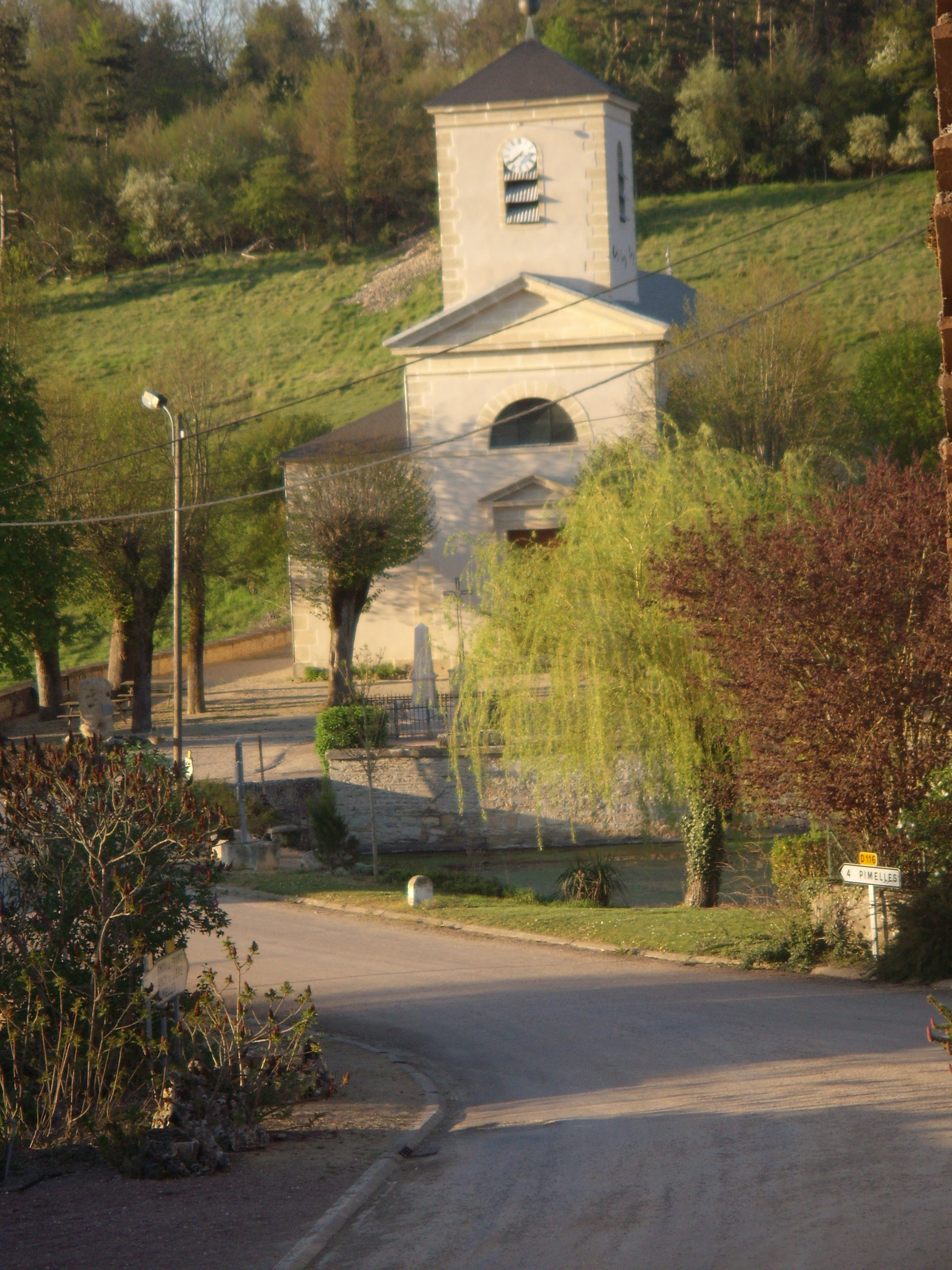 EgliseGland89.jpg